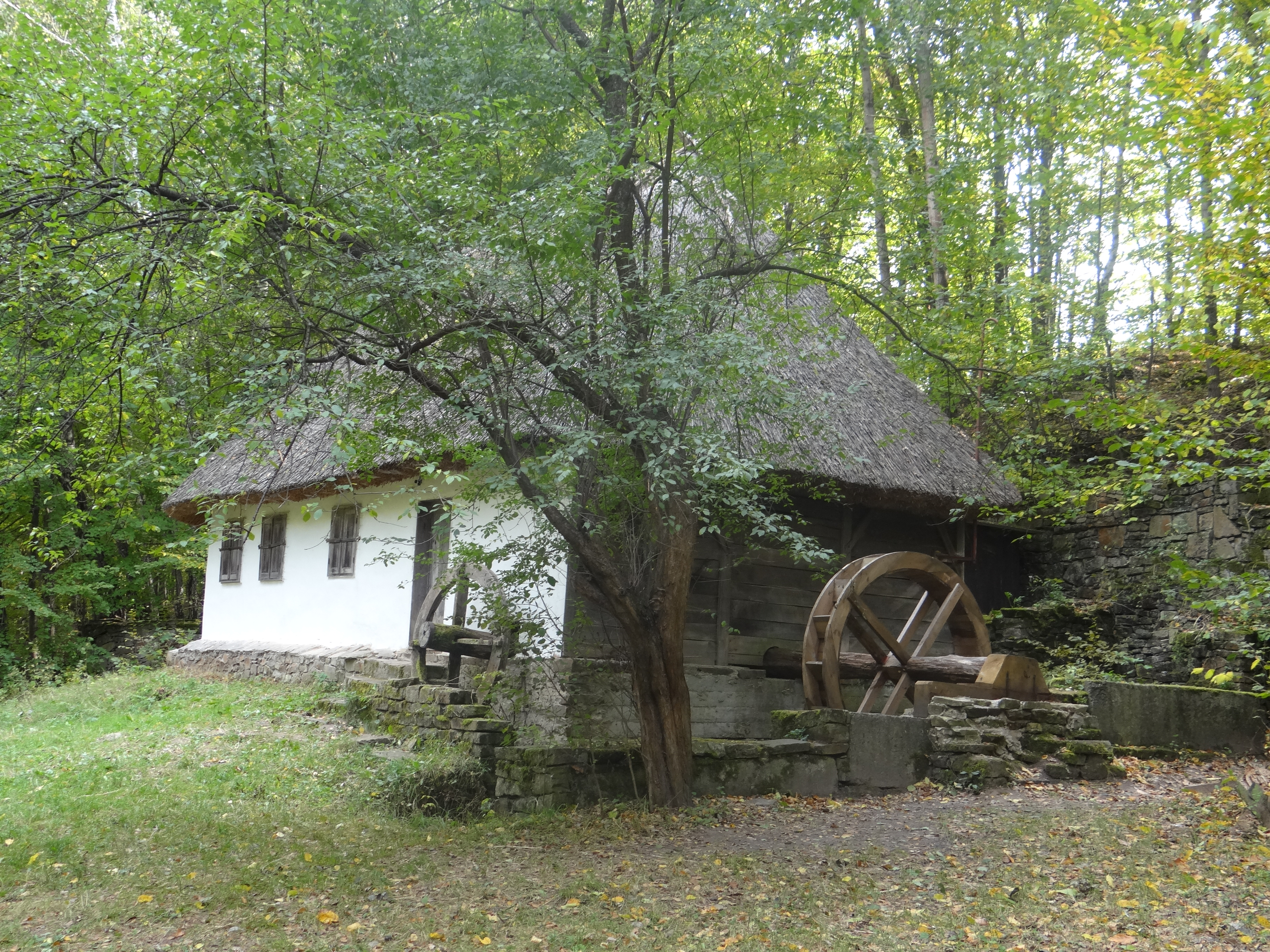 Хата-млин з села Ломачинці Сокирянського району Чернівецької області, Київ, Пирогів